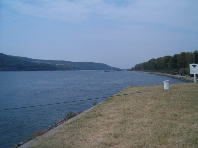 Dunarea la bechet